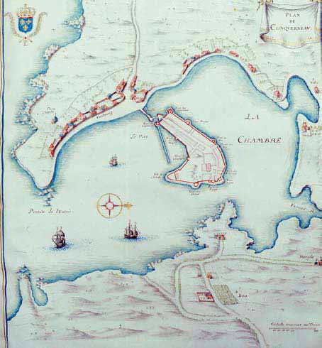 Plan de la ville close de Concarneau dont la fortification remonte au moins à 1451. État antérieur aux travaux de fortification de Vauban.